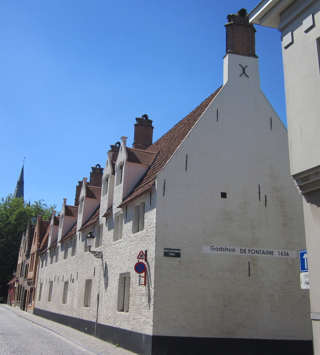 Godshuis De la Fontaine (1636), Zwarteleertouwersstraat 82 in Brugge 5″ N, 3° 13′ 59.23″ E